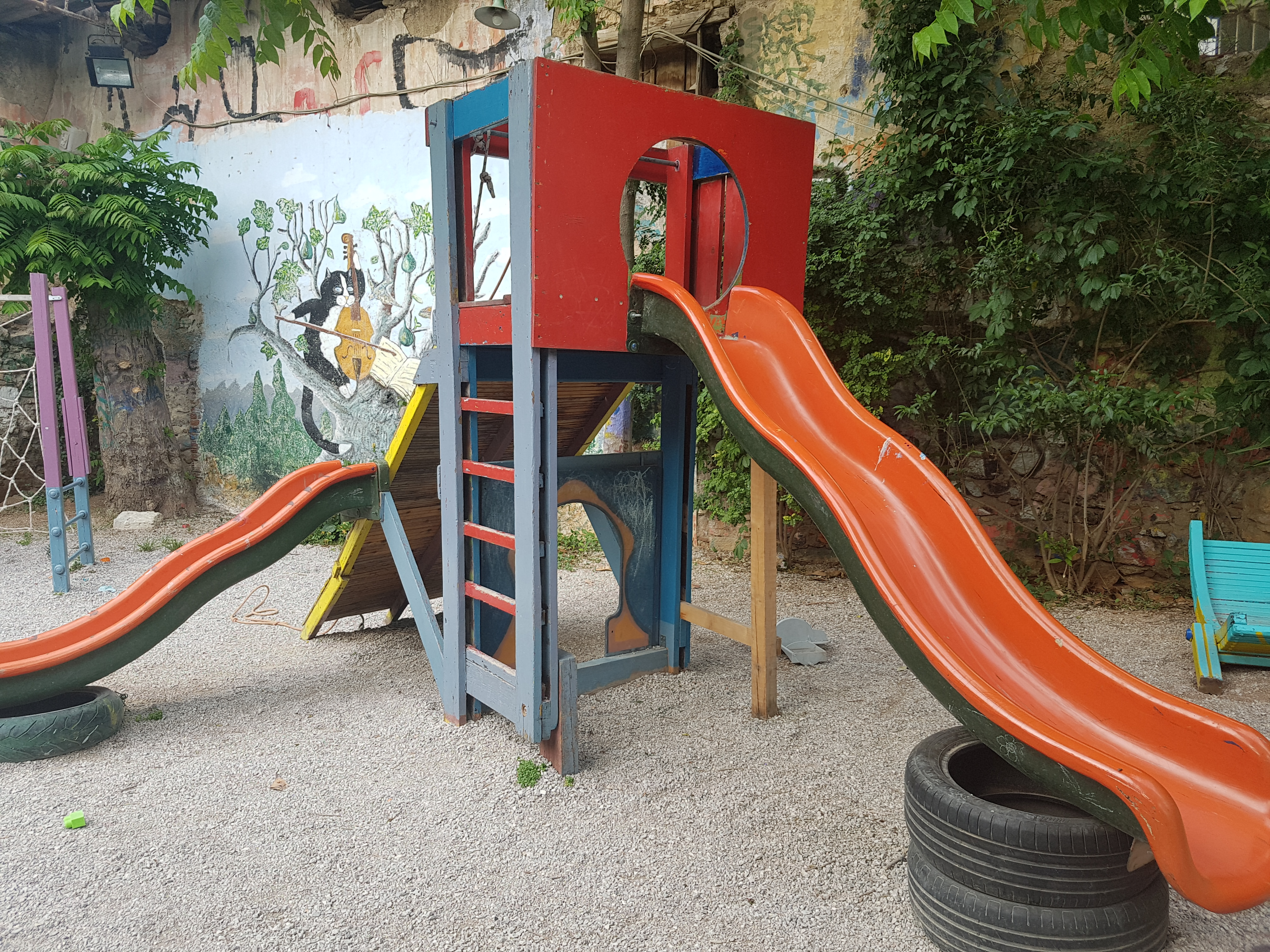 Playground at Navarinoy square